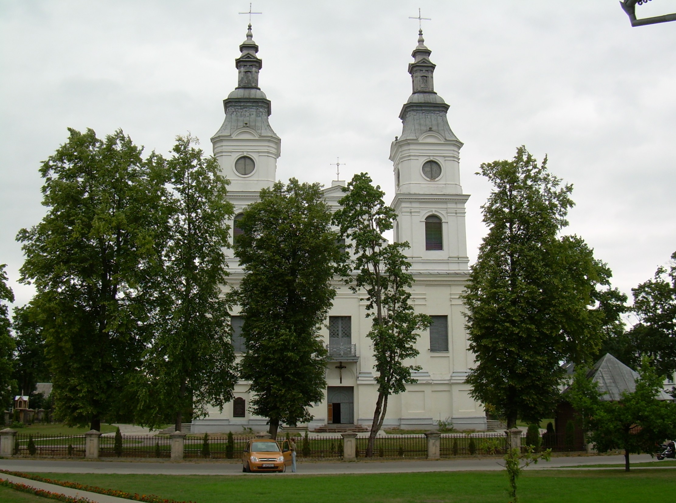 Žemaičių Kalvarijos Švč. Mergelės Marijos Apsilankymo mažoji bazilika